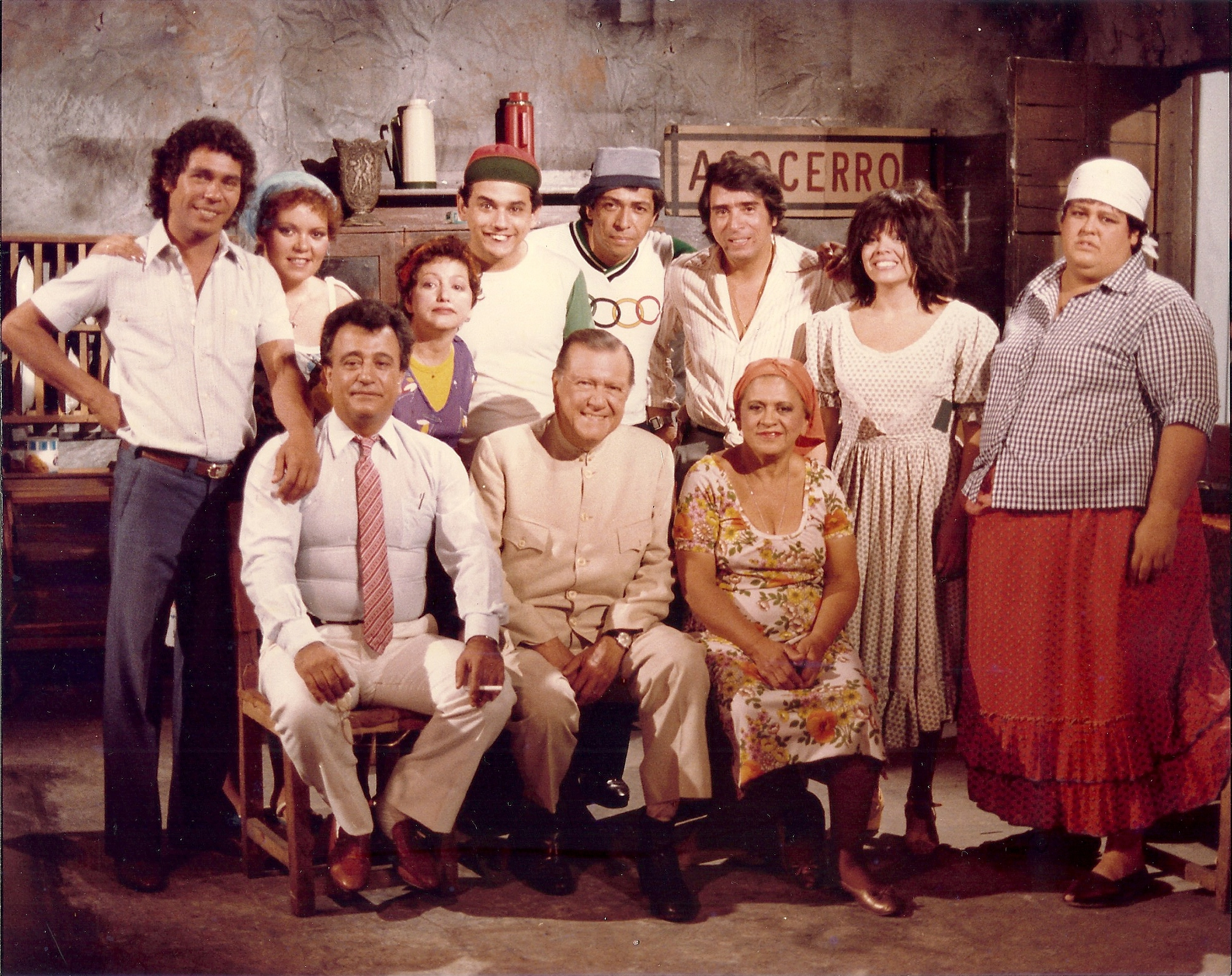 El candidato presidencial Rafael Caldera con los integrantes del sketch Asocerro, del programa cómico Radio Rochela, de Radio Caracas Televisión.